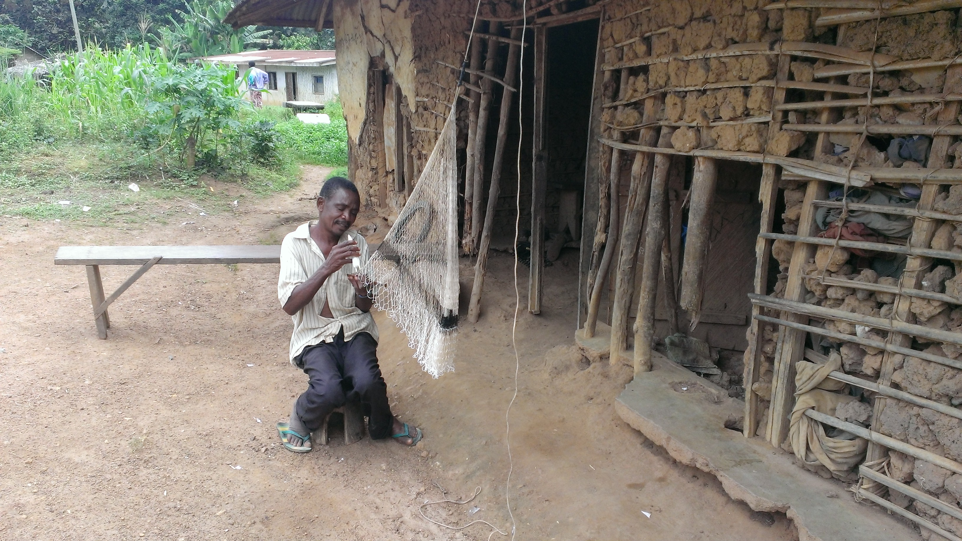 Un tisserand de filet à pêche.